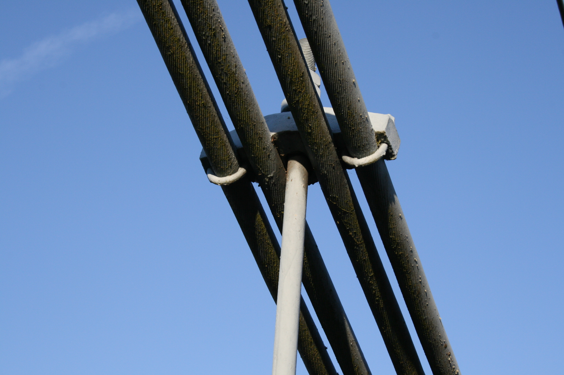 Pont de Châtillon-sur-Loire (Loiret - France) - Pont suspendu franchissant la Loire - Vue détaillée d'un chevalet de suspension raccordant la suspente au câble porteur.